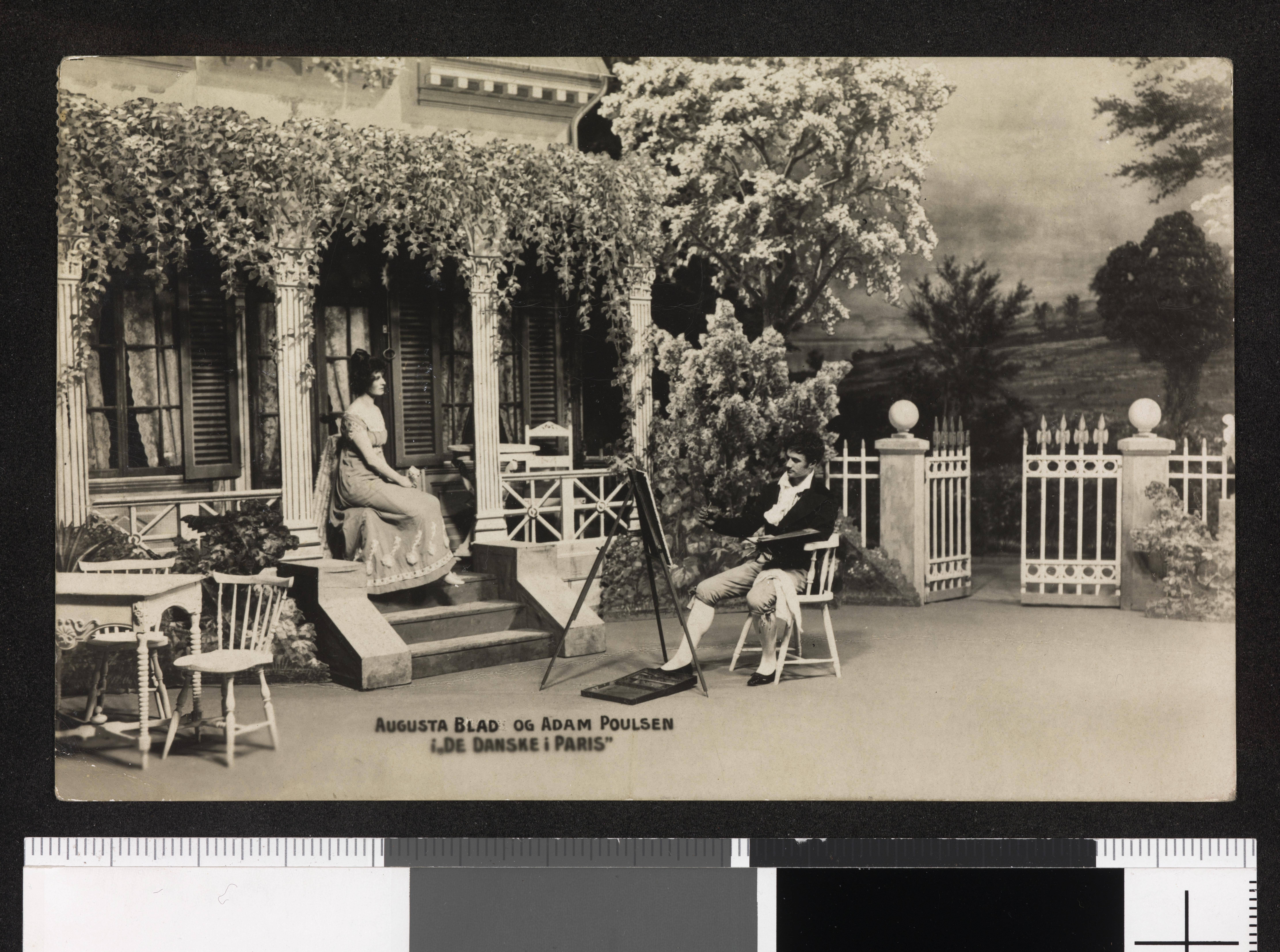 Bildet er hentet fra Nasjonalbibliotekets bildesamling Depicted person: Blad, Augusta Depicted person: Poulsen, Adam